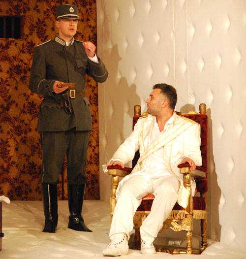 Moja fotografija.